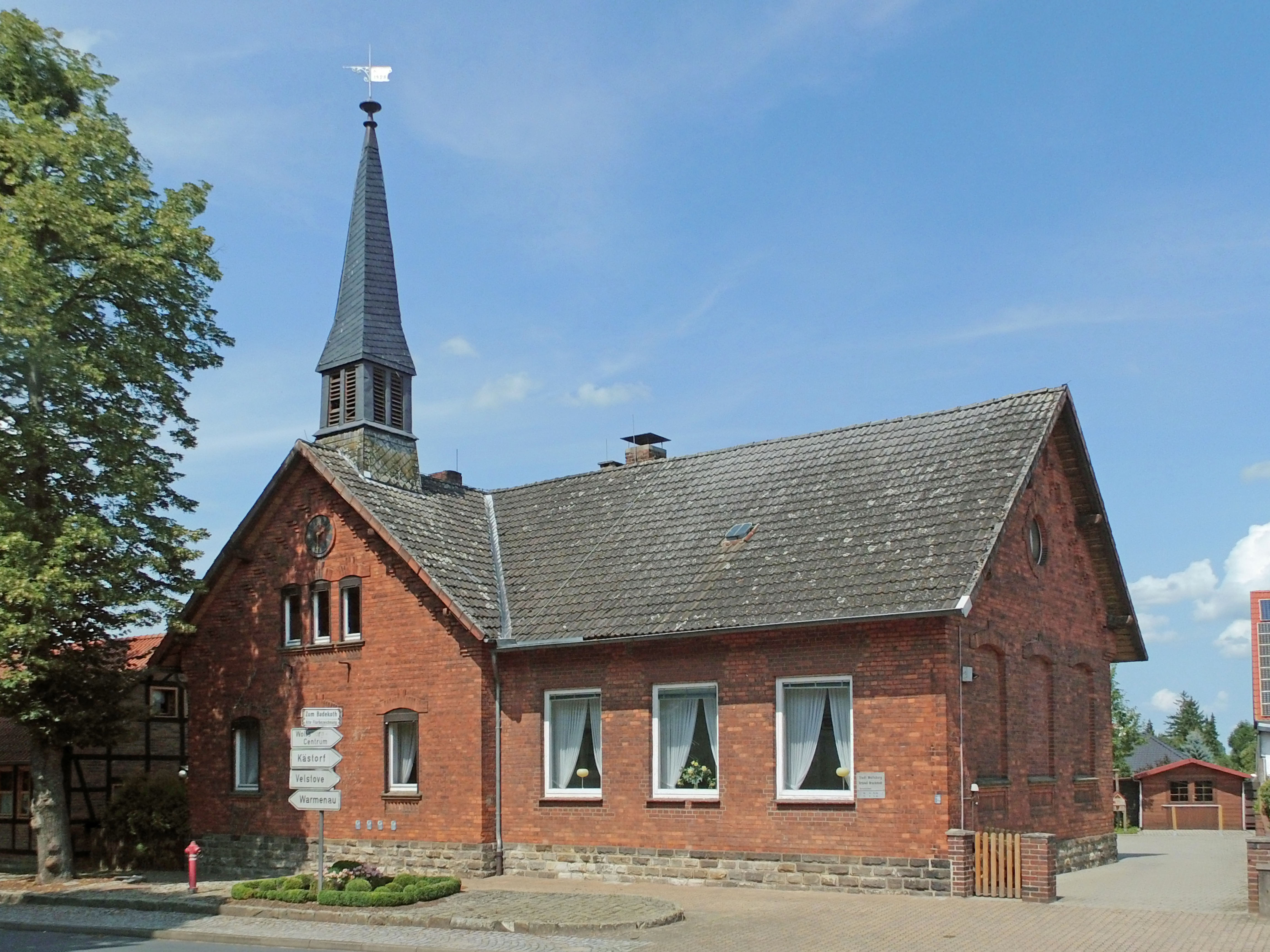 Ehemalige Schule in Brackstedt (Ortsteil von Wolfsburg)